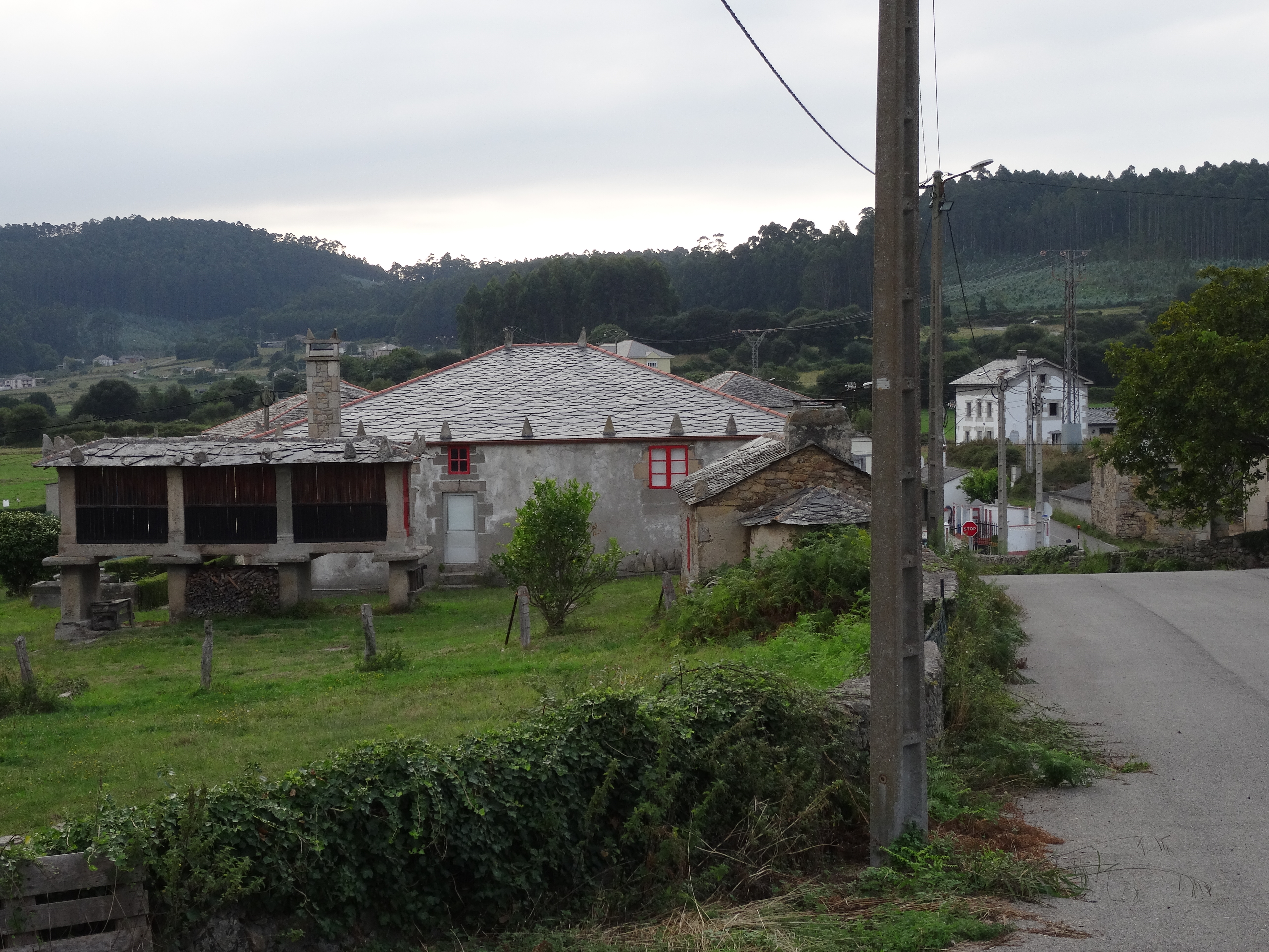 Ver título.